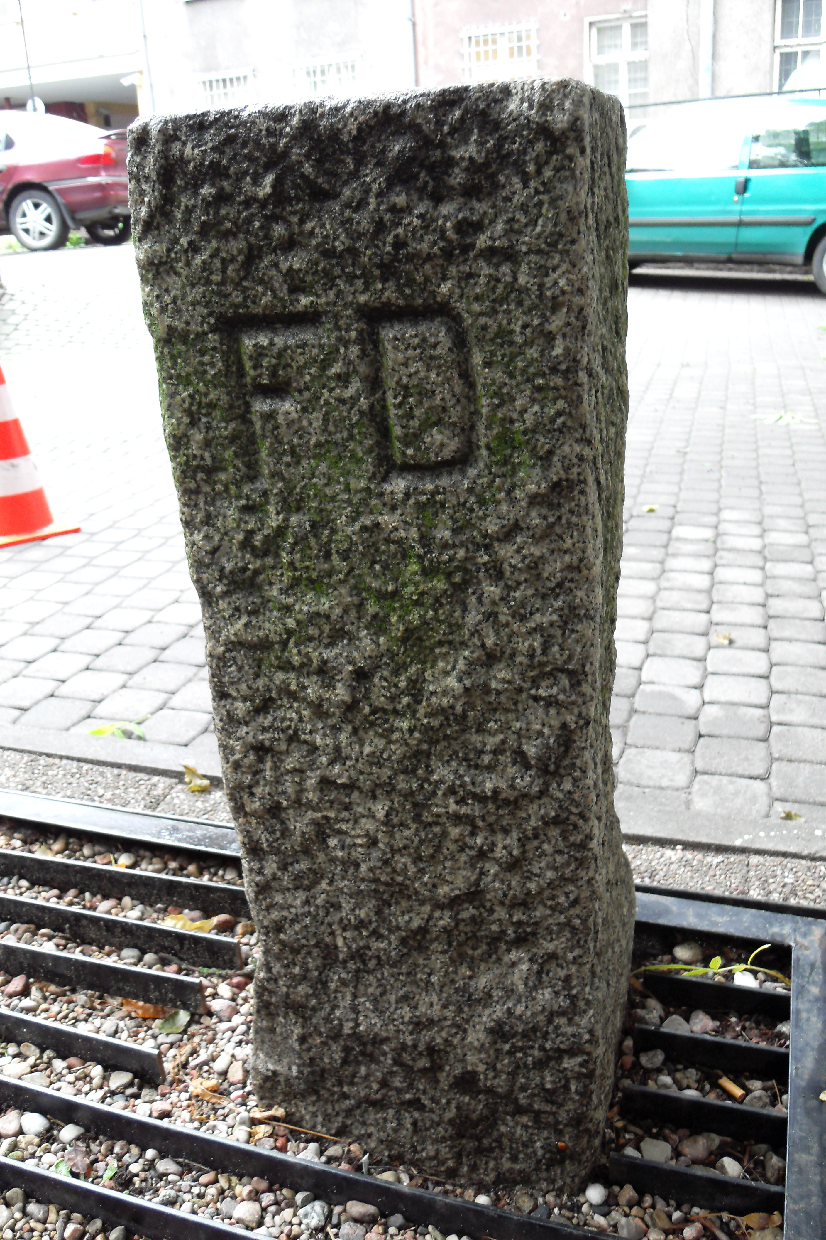 Oryginalny kamień graniczny Wolnego Miasta Gdańska i Polski. Przechowywany jest na dziedzińcu Muzuem Historycznego Miasta Gdańska.